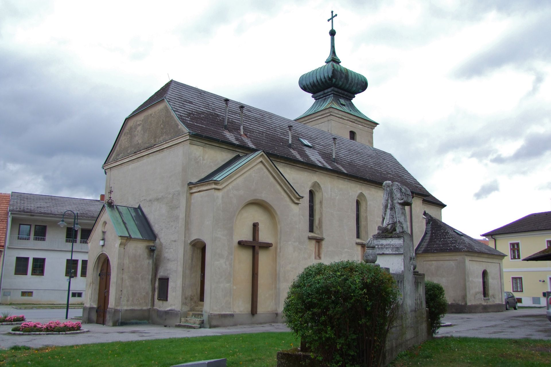 Kath. Pfarrkirche hl. Leopold und Kriegerdenkmal von hinten.